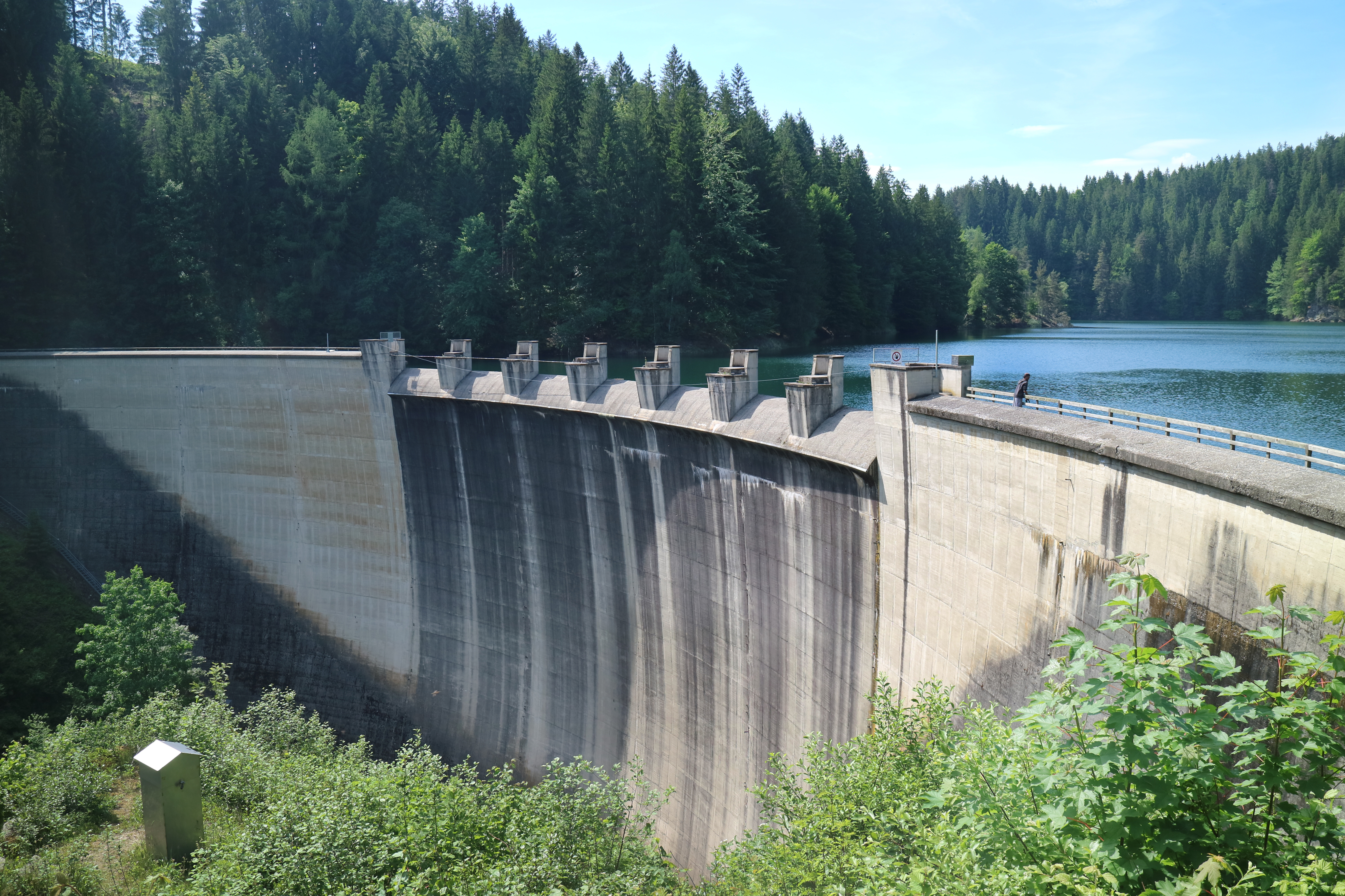 Hirzmannsperre, Gemeinde St. Martin am Wöllmißberg, Steiermark